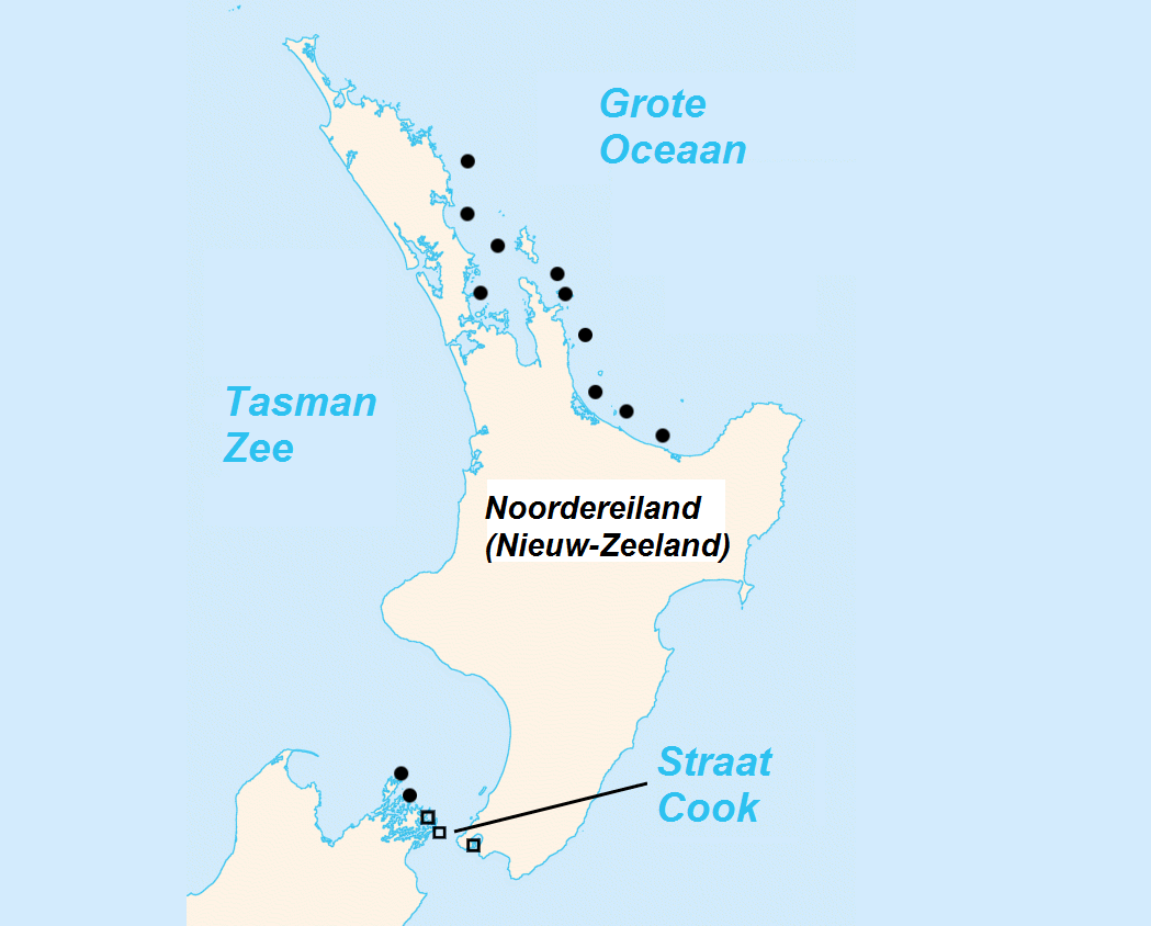 Verspreiding van de brughagedis. Een rondje is voor de North Island brughagedis, een vierkantje voor de Brothers Island brughagedis. Een symbool kan tot zeven eilanden voorstellen.